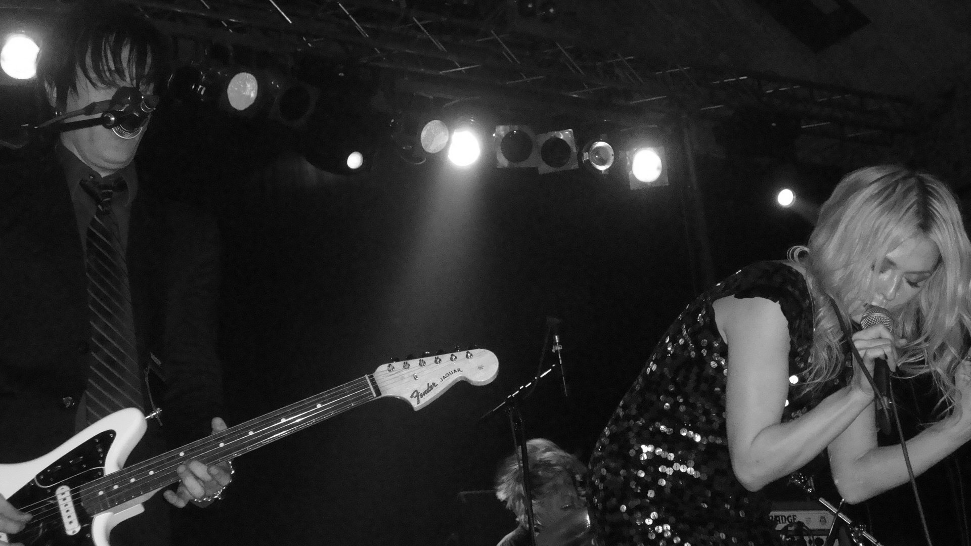 Troy Van Leeuwen & Serrina Sims